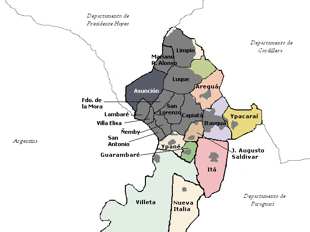 Zona urbana del Área Metropolitana de Asunción en Paraguay.